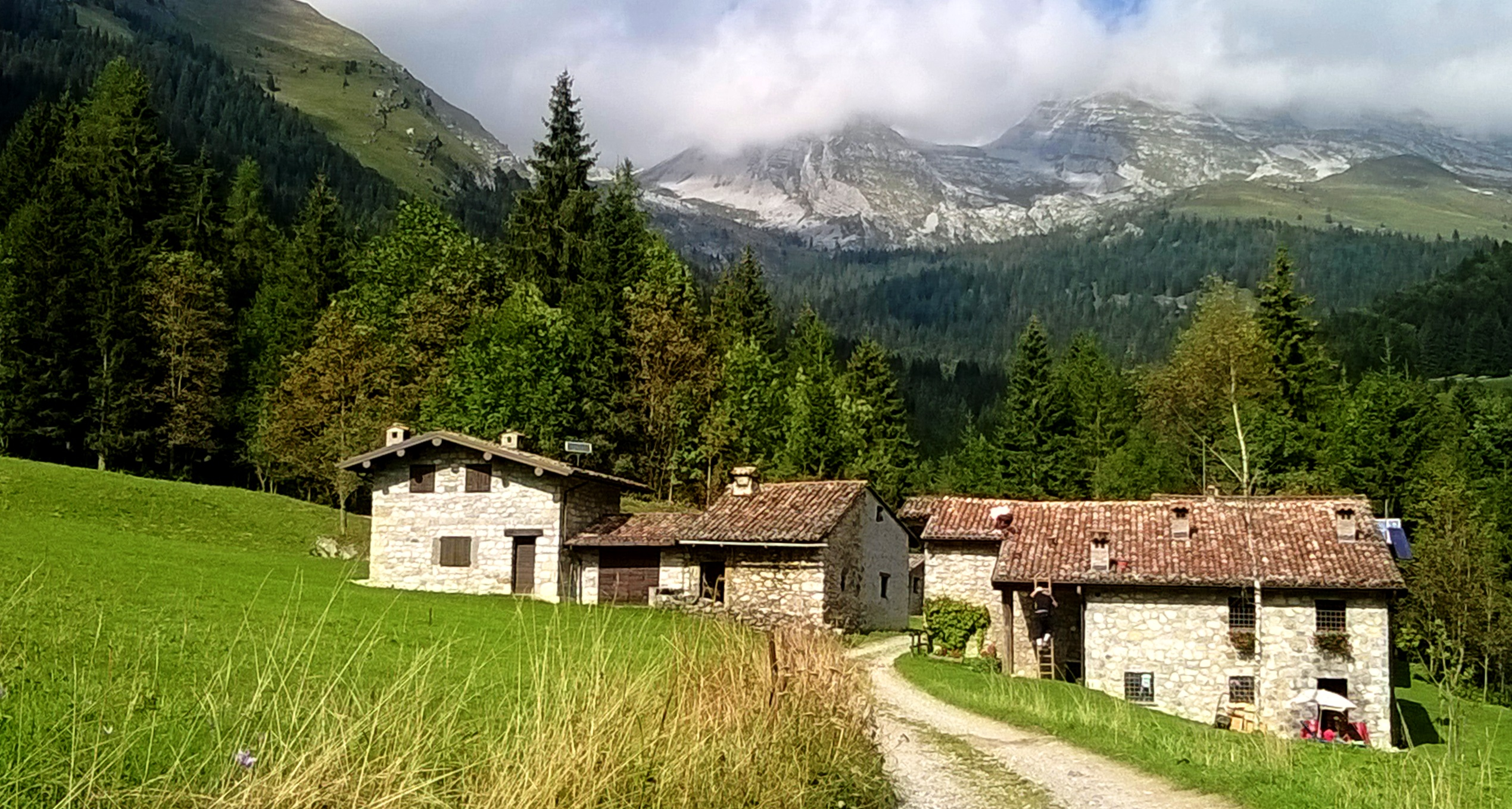 Baite del Moschel. Oltressenda alta (BG). Italy